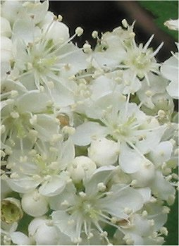 Sorbus aucuparia flowers (Wilde lijsterbes bloemen)